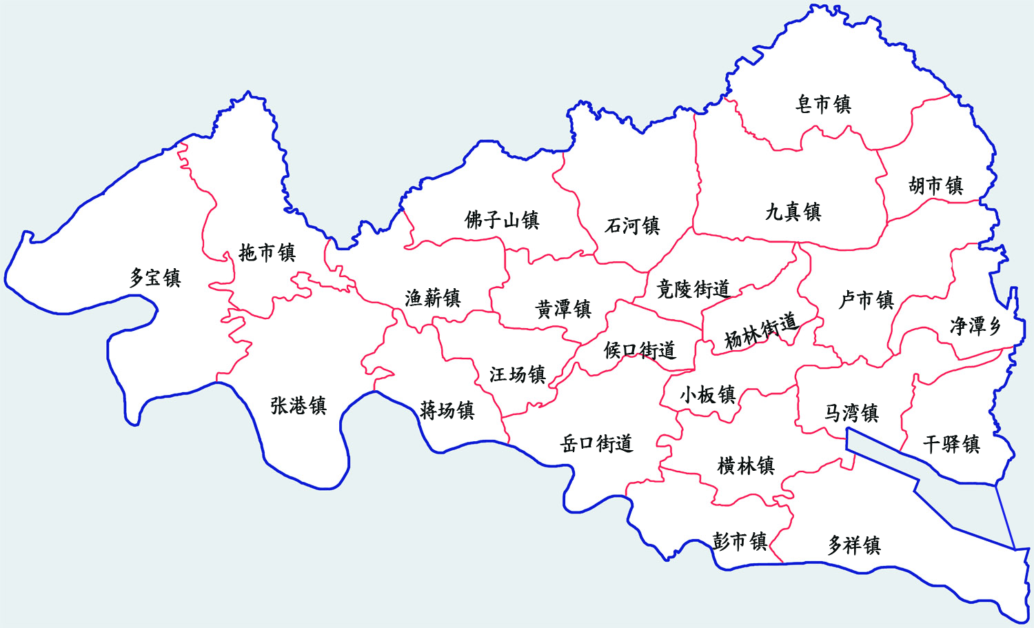 텐먼사 행정구역